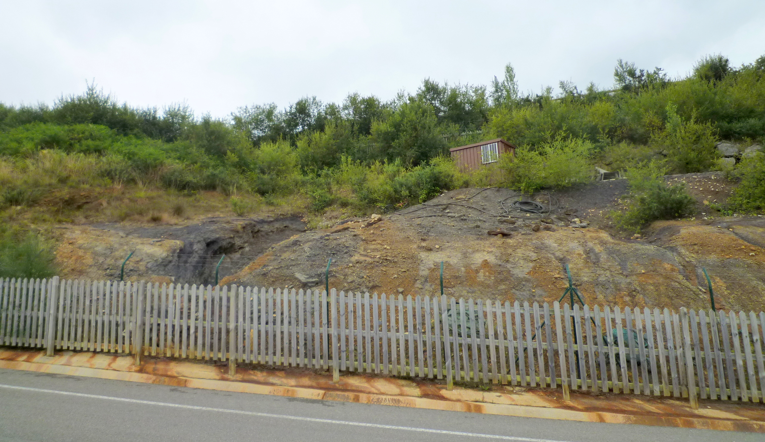 Yacimiento paleontológico de Rábago/El Soplao, Herrerías, Cantabria, España.